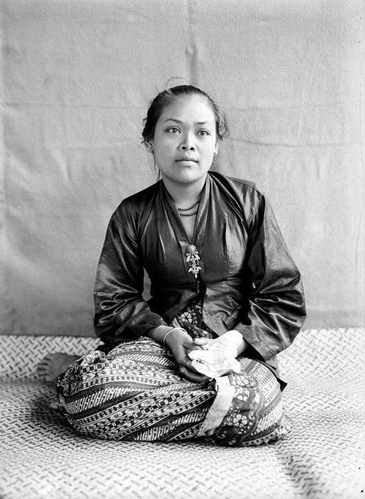 Negatief. Portret van een Sundanese vrouw met een peniti tak broche